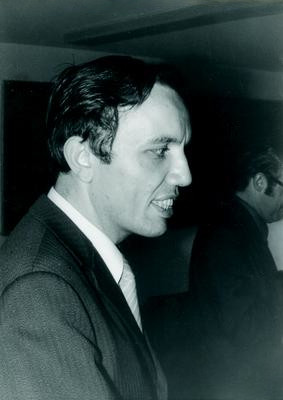 Foto di Dominique Foata